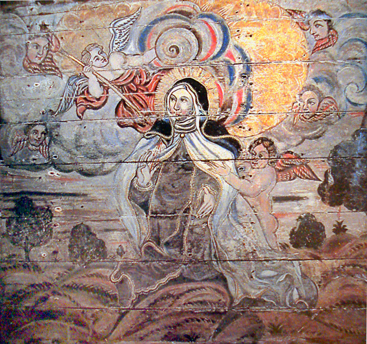 Cenas da vida de Santa Teresa, Igreja do Carmo, São Cristóvão, SE, Brasil. Fim do século XVIII.